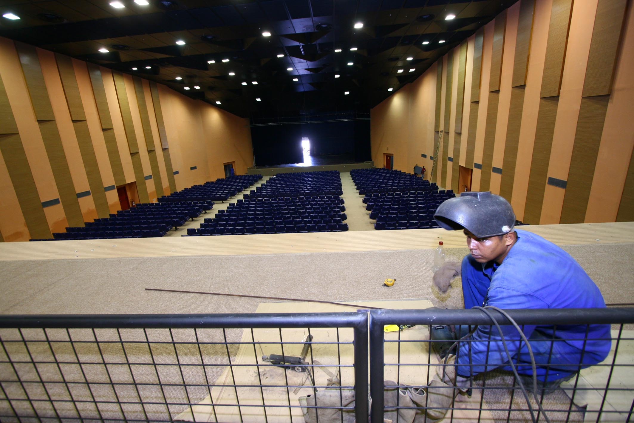 Obras de recuperação do Centro de Convenções da Bahia Na foto:Operário trabalha na recuperação do Centro de Convenções da Bahia Foto:Alberto Coutinho/AGECOM